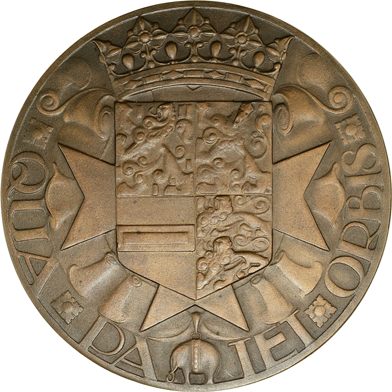 Johan Maurits van Nassau (voorzijde), tweede penning 1929 van de Vereniging voor Penningkunst, ontworpen door Chris van der Hoef.